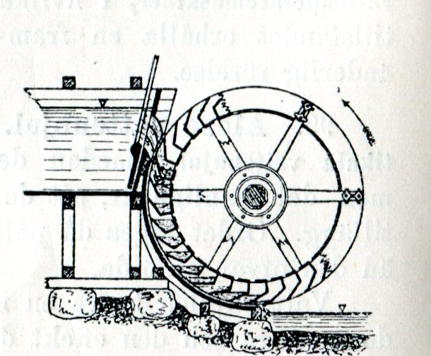 Verkan genom tyngd